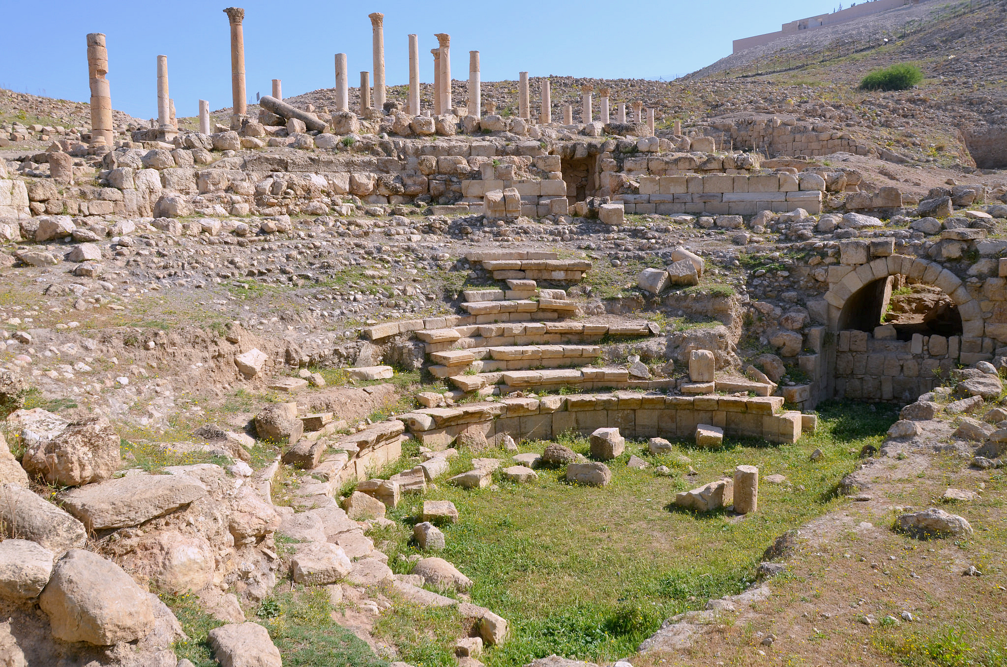 Pella, Jordan